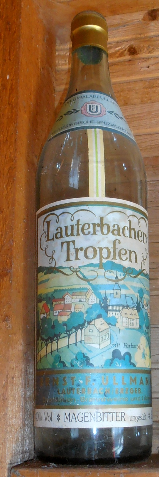 Historische Flasche Lauterbacher Tropfen Fotografiert im Glashüttenmuseum des Erzgebirges in Neuhausen/Erzgeb.